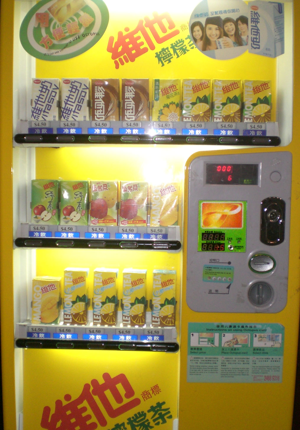 尖沙咀香港太空館室內